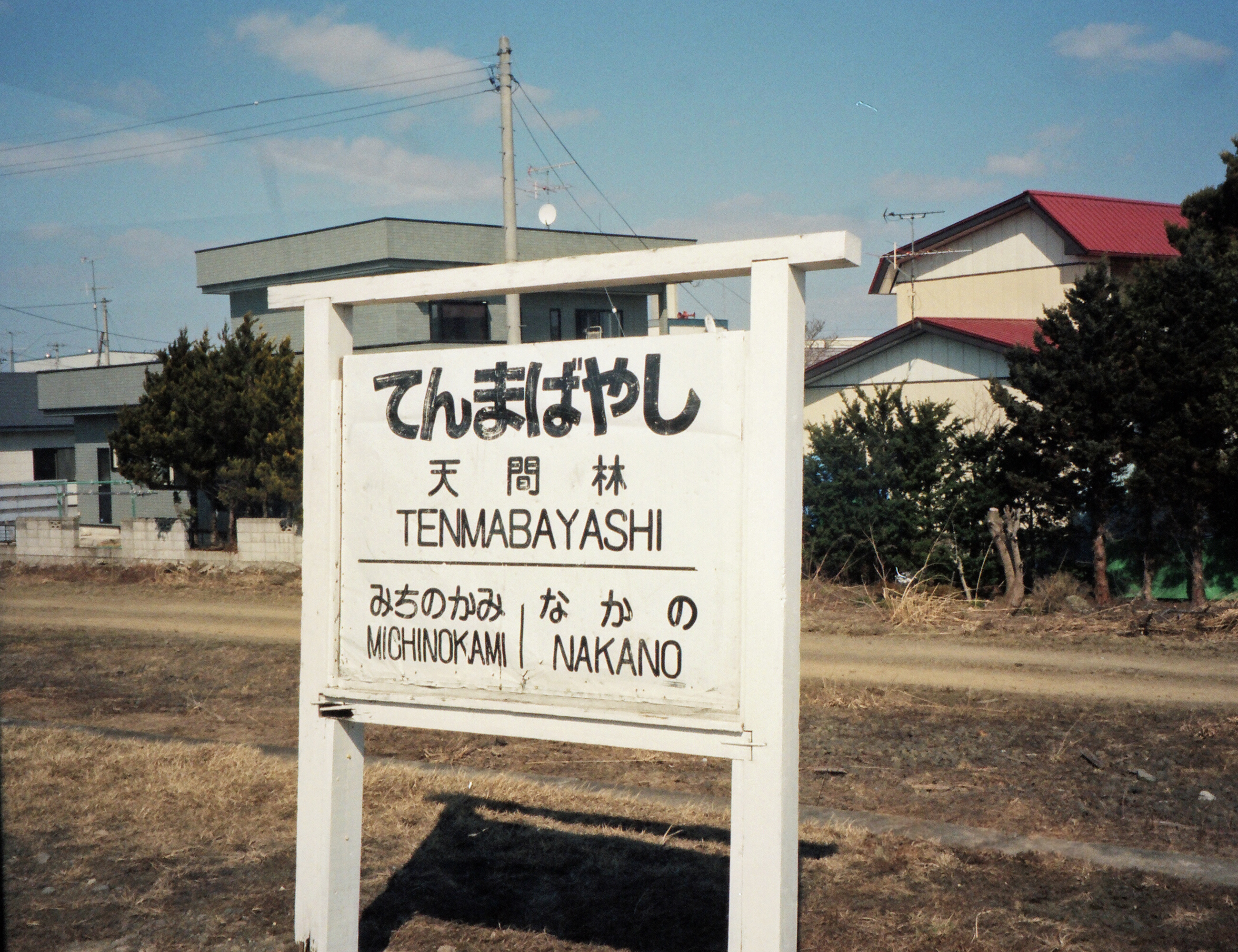 南部縦貫鉄道線 天間林駅（1997年3月26日撮影）